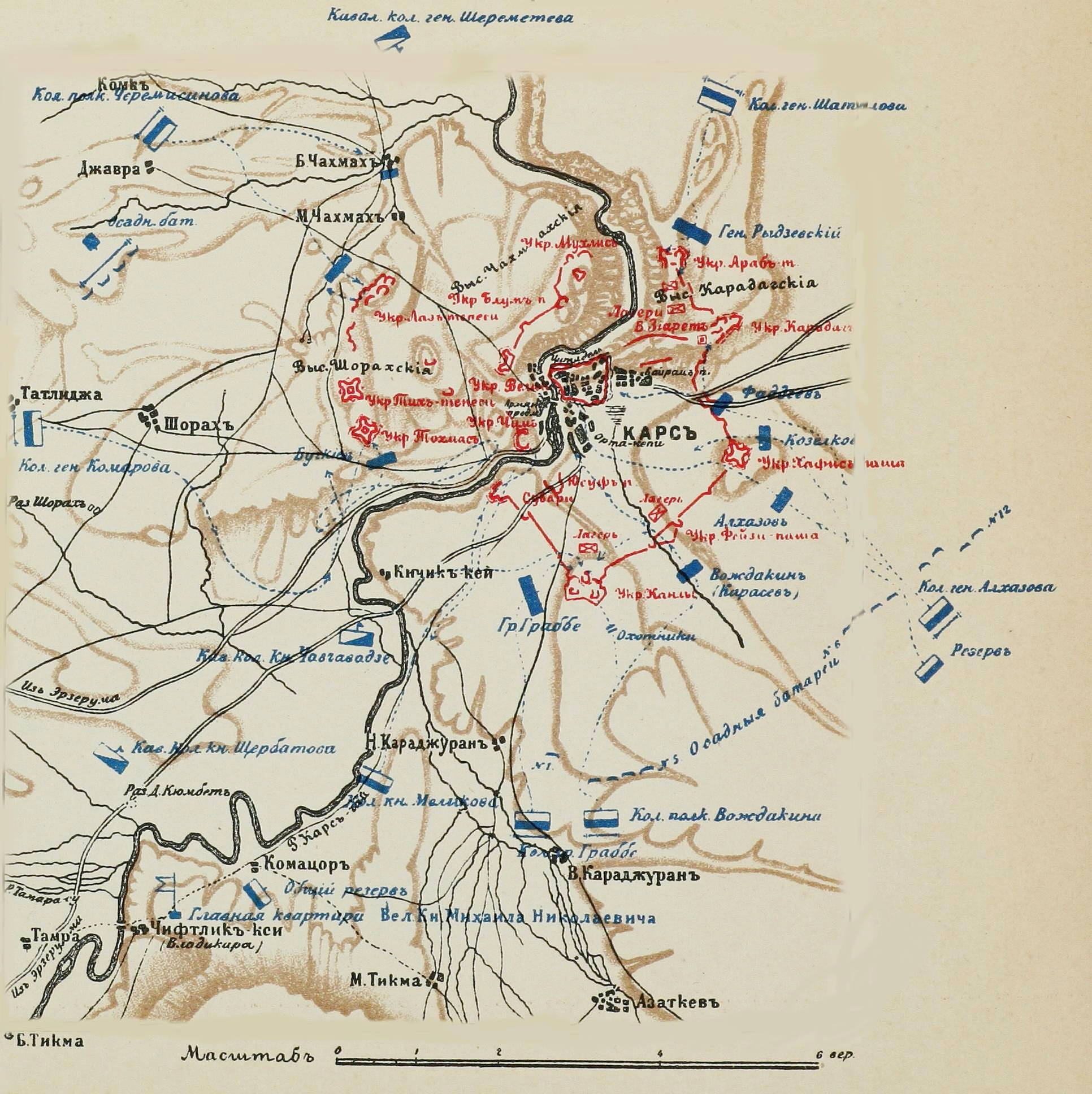 ПЛАН ШТУРМА КАРСА в ночь с 5-го на 6-е ноября 1877 года. Это изображение было использовано для иллюстрирования статьи «Карс» опубликованной в двенадцатом томе «Военной энциклопедии», который был издан книгоиздательским товариществом И. Д. Сытина в 1913 году в столице Российской империи городе Санкт-Петербурге. Более подробное описание к этой картинке можно прочесть в указанной выше статье.